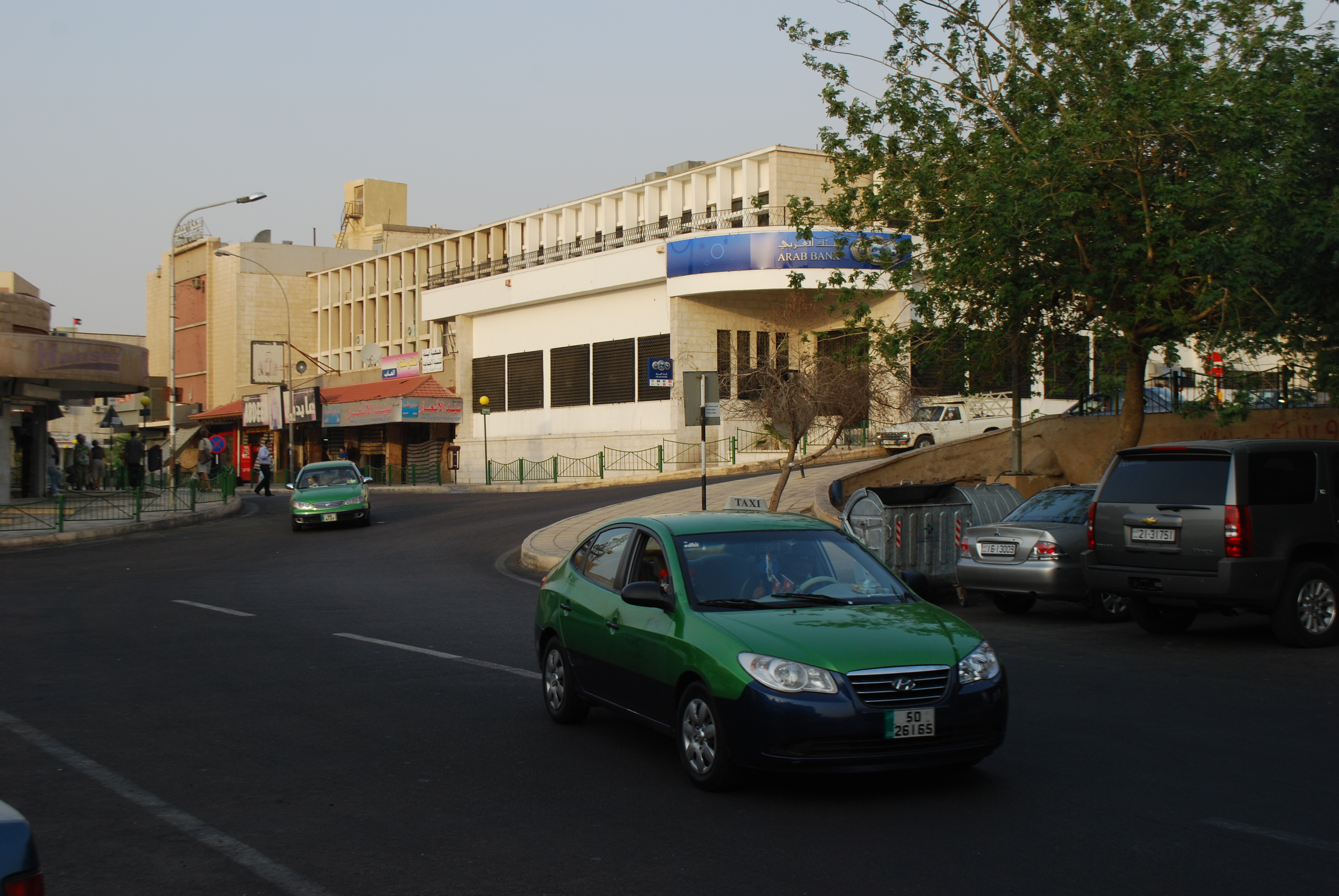 Taxis à Aqaba.